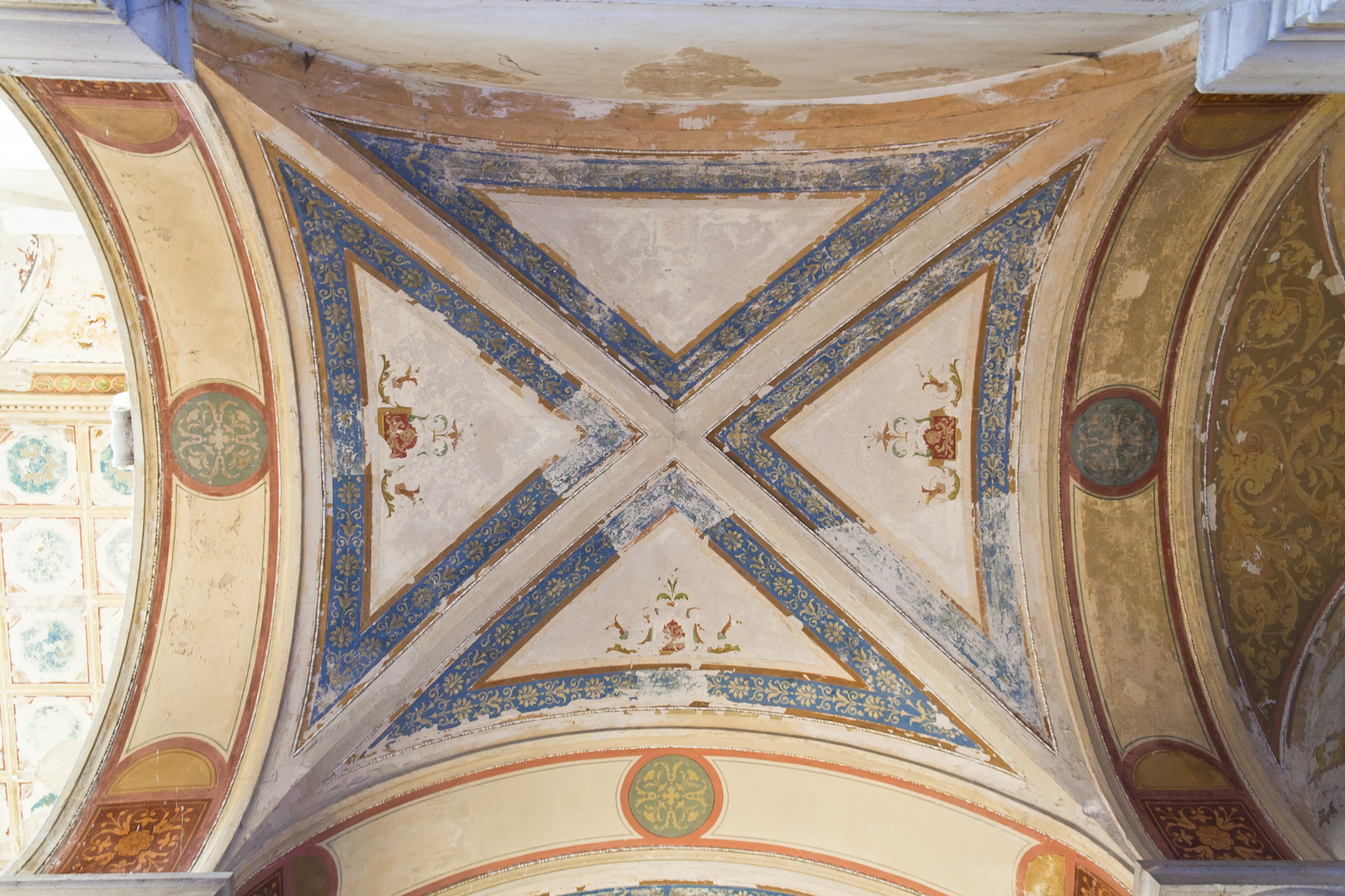 Schossberger-kastély (Tura, Kossuth u.)